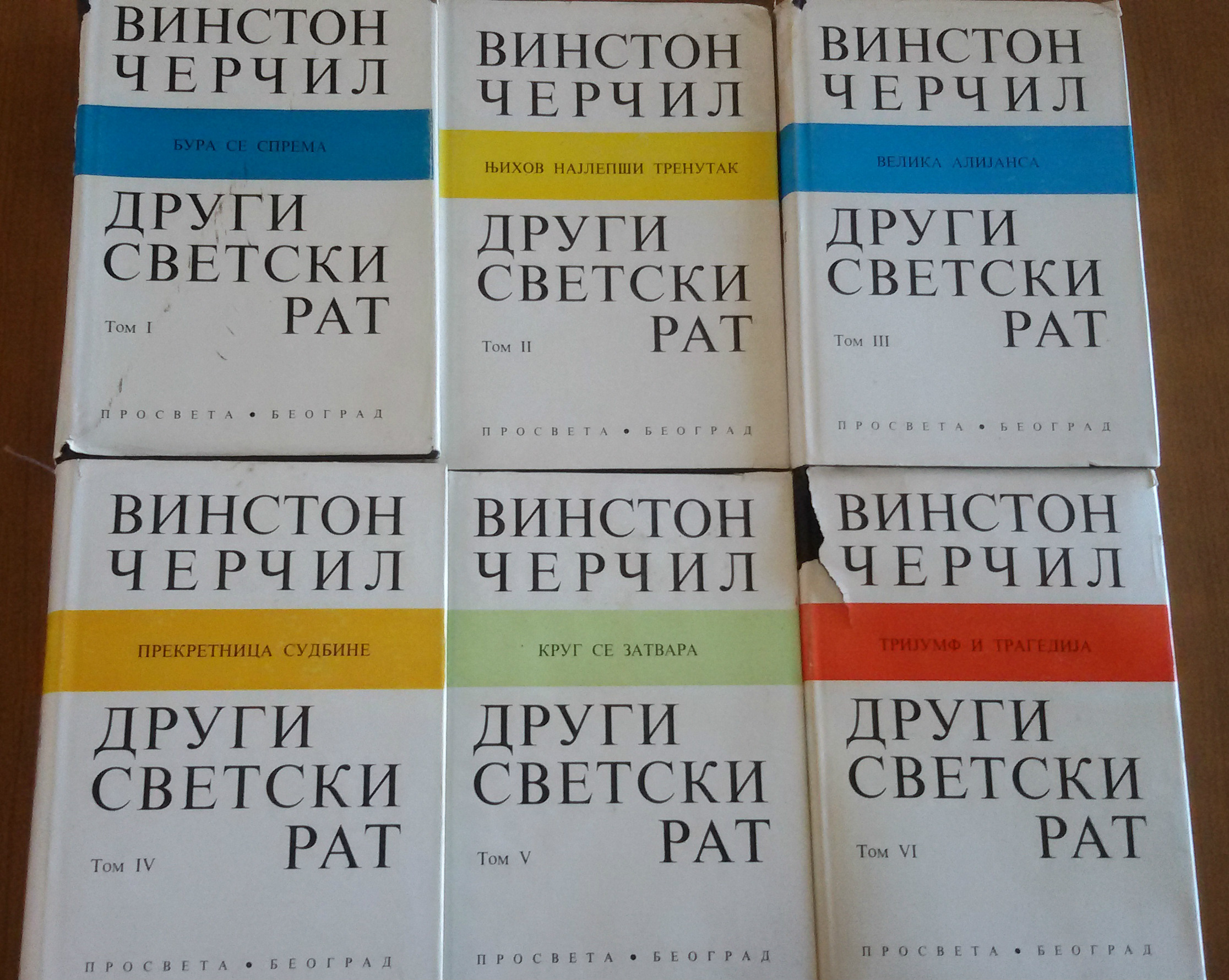 Серијал књига "Други светски рат" Винстона Черчила на српском језику